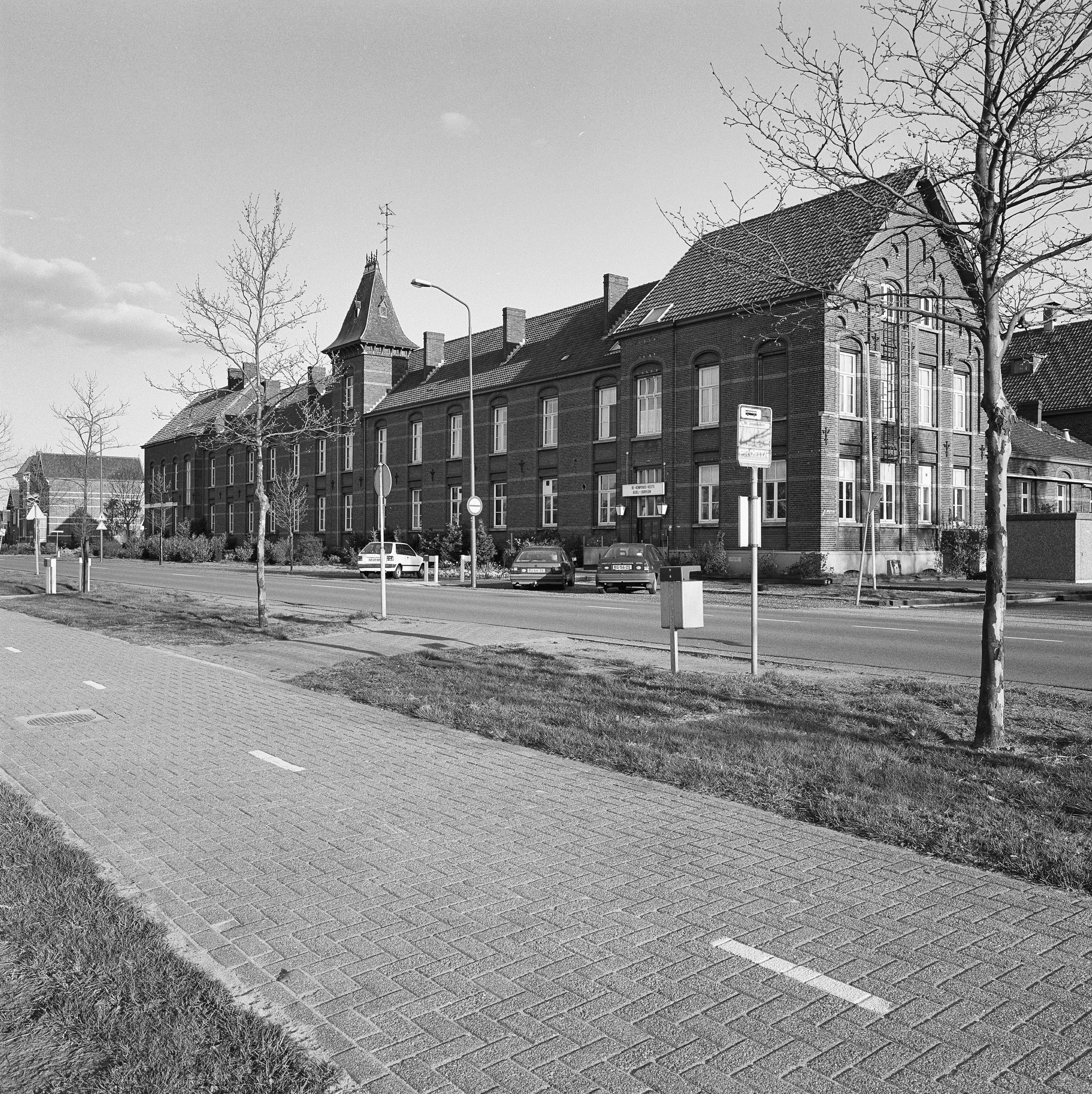 Hotel Sint Joseph, De Cantine: Overzicht voorgevel en rechter zijgevel (opmerking: Gefotografeerd voor Monumenten In Nederland Noord-Brabant, bladzijde 124)